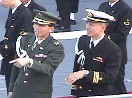 adjutant,aiguillette,JMSDF and JGSDF,Japan